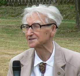 Búza Barna (1910-2010) szobrás, éremművész, a Klebelsberg mwllszobornál